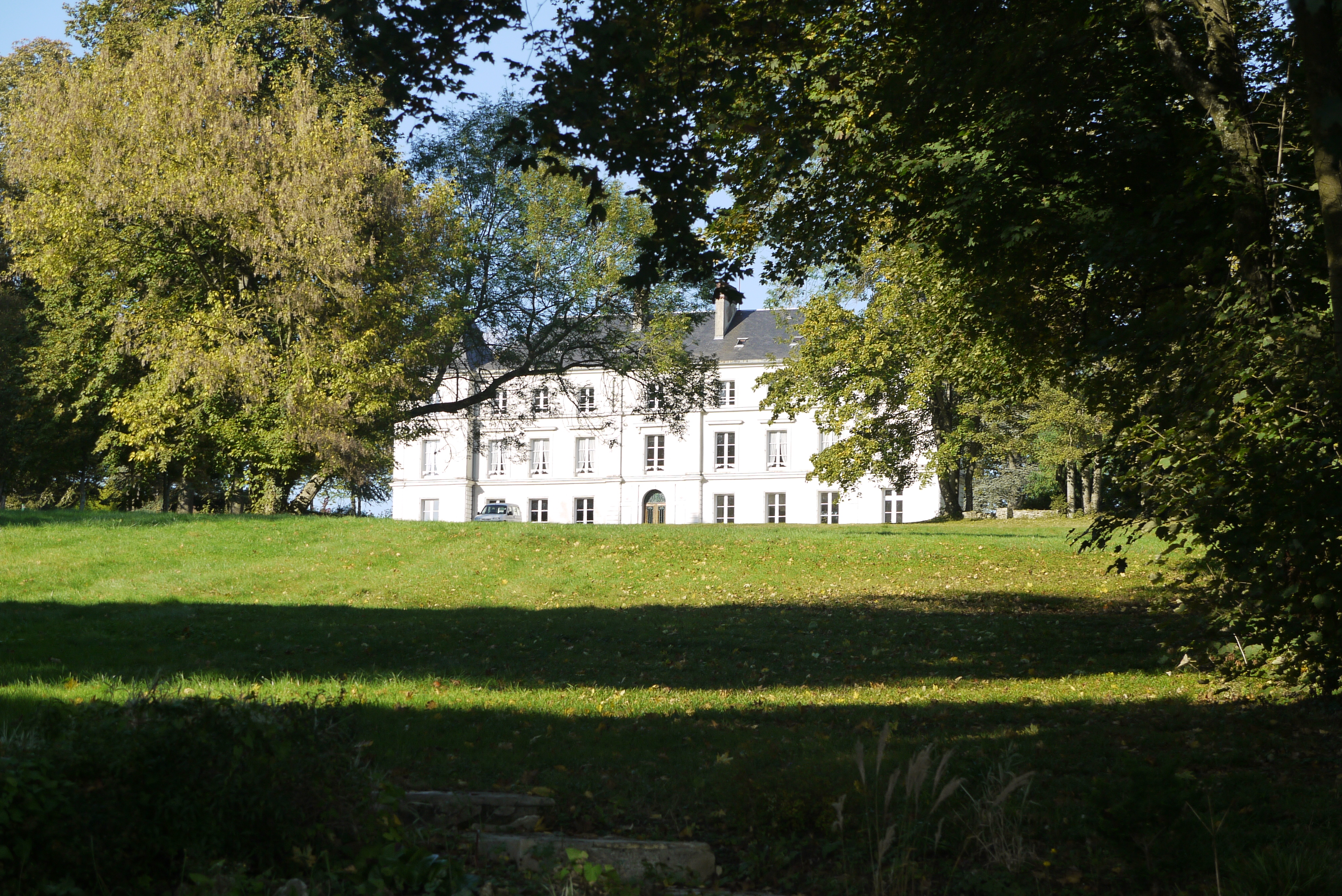 Château de Verdilly, Centre de Formation Professionnelle et de Promotion Agricoles.